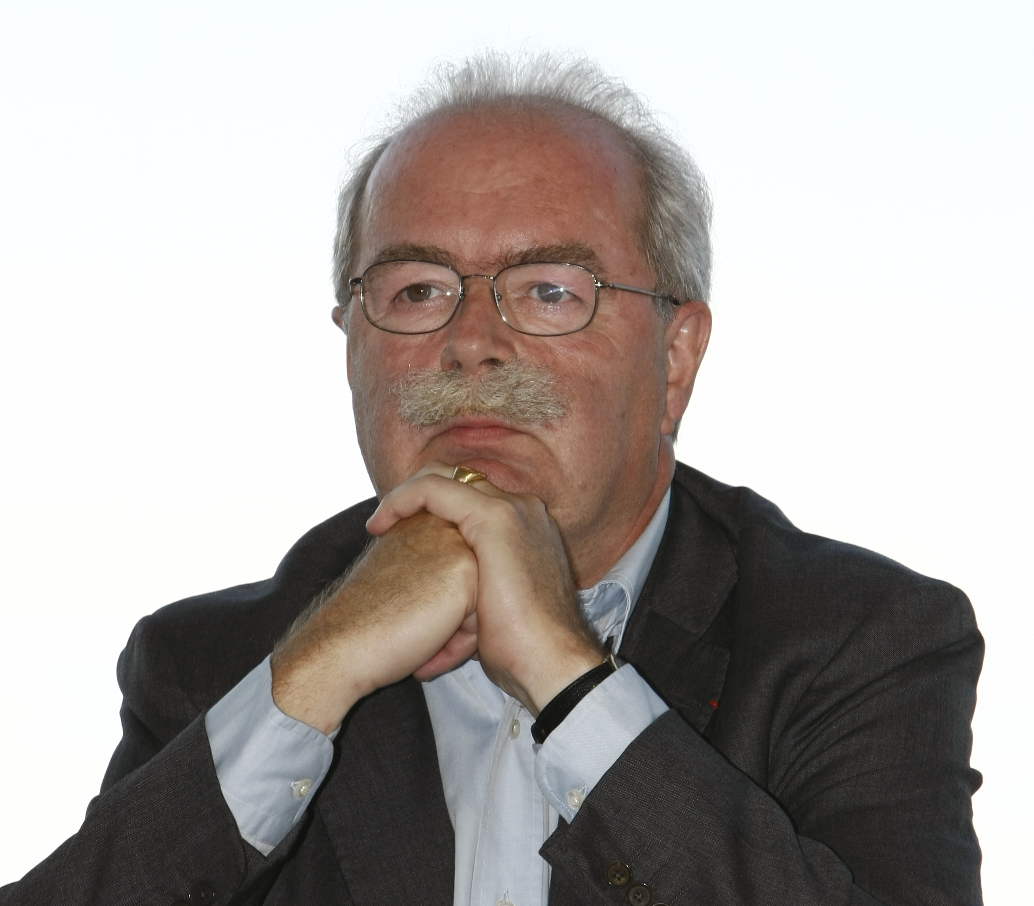 Christophe de Margerie, homme d'affaires français